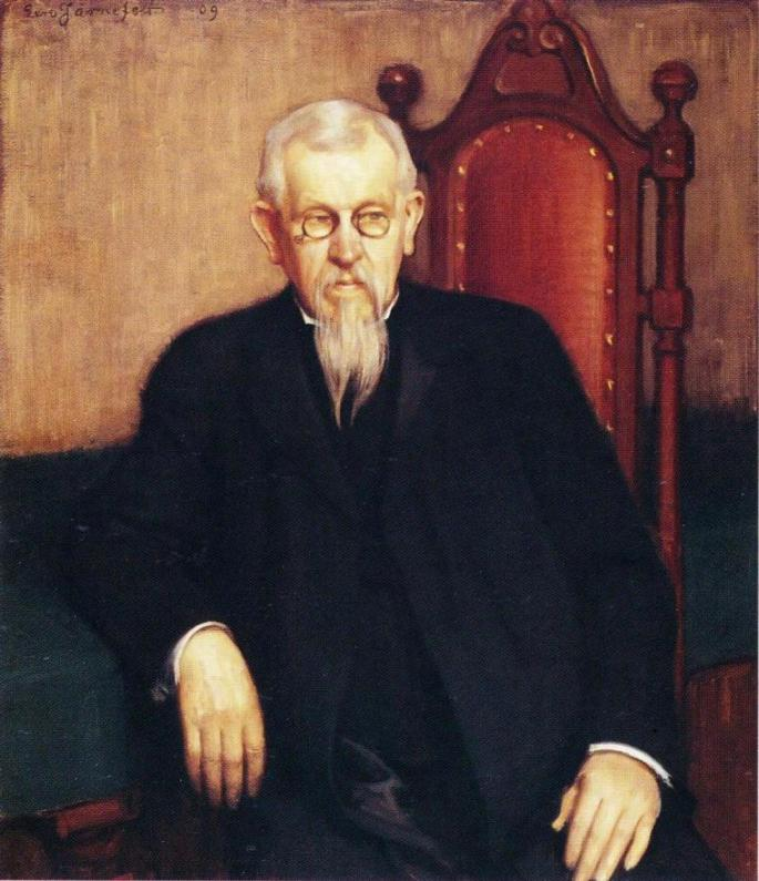 Kansallis-Osake-Pankin tilaama muotokuva pääjohtajastaan Fredrik Kristian Nybomista (1838–1927) hänen 70-vuotispäivänsä kunniaksi. Tämä oli KOP:n ensimmäinen taidehankinta.